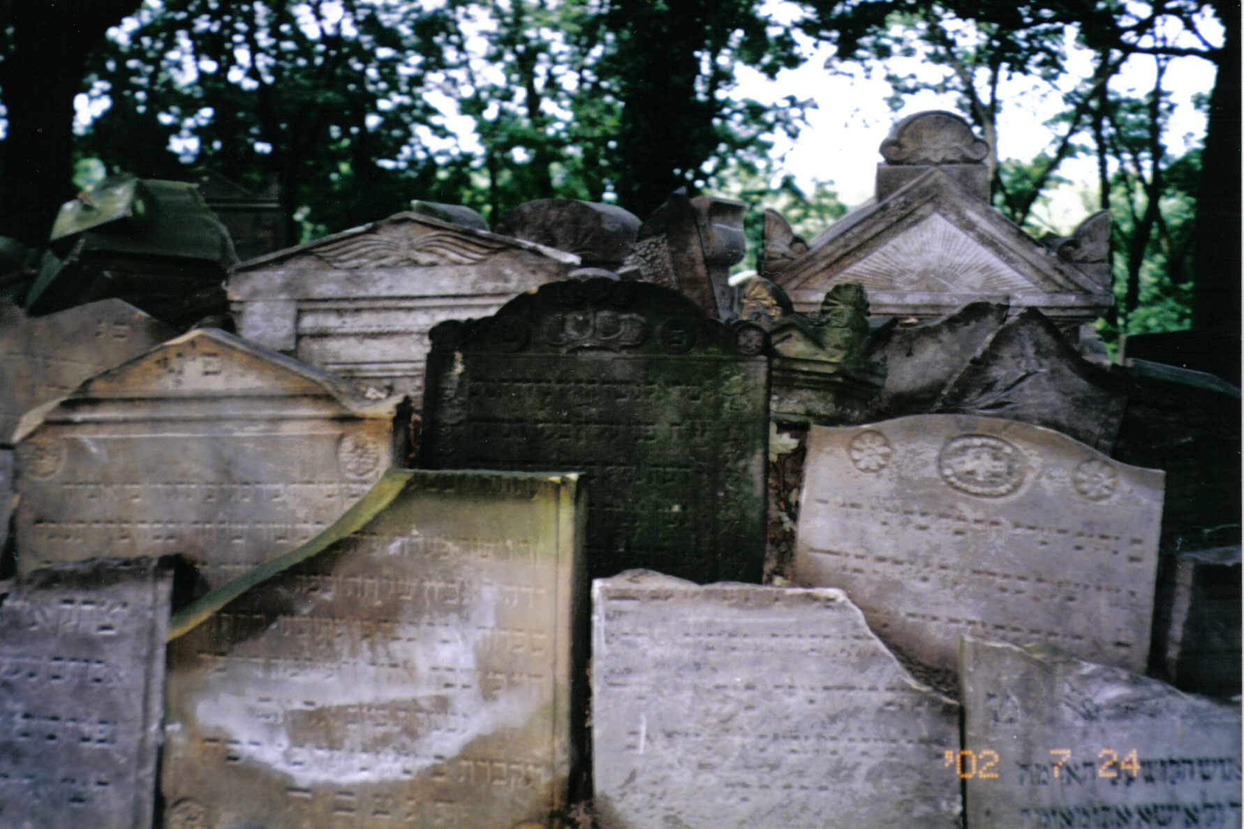 Lapidarium na cmentarzu żydowskim w Skwierzynie, woj. lubuskie.